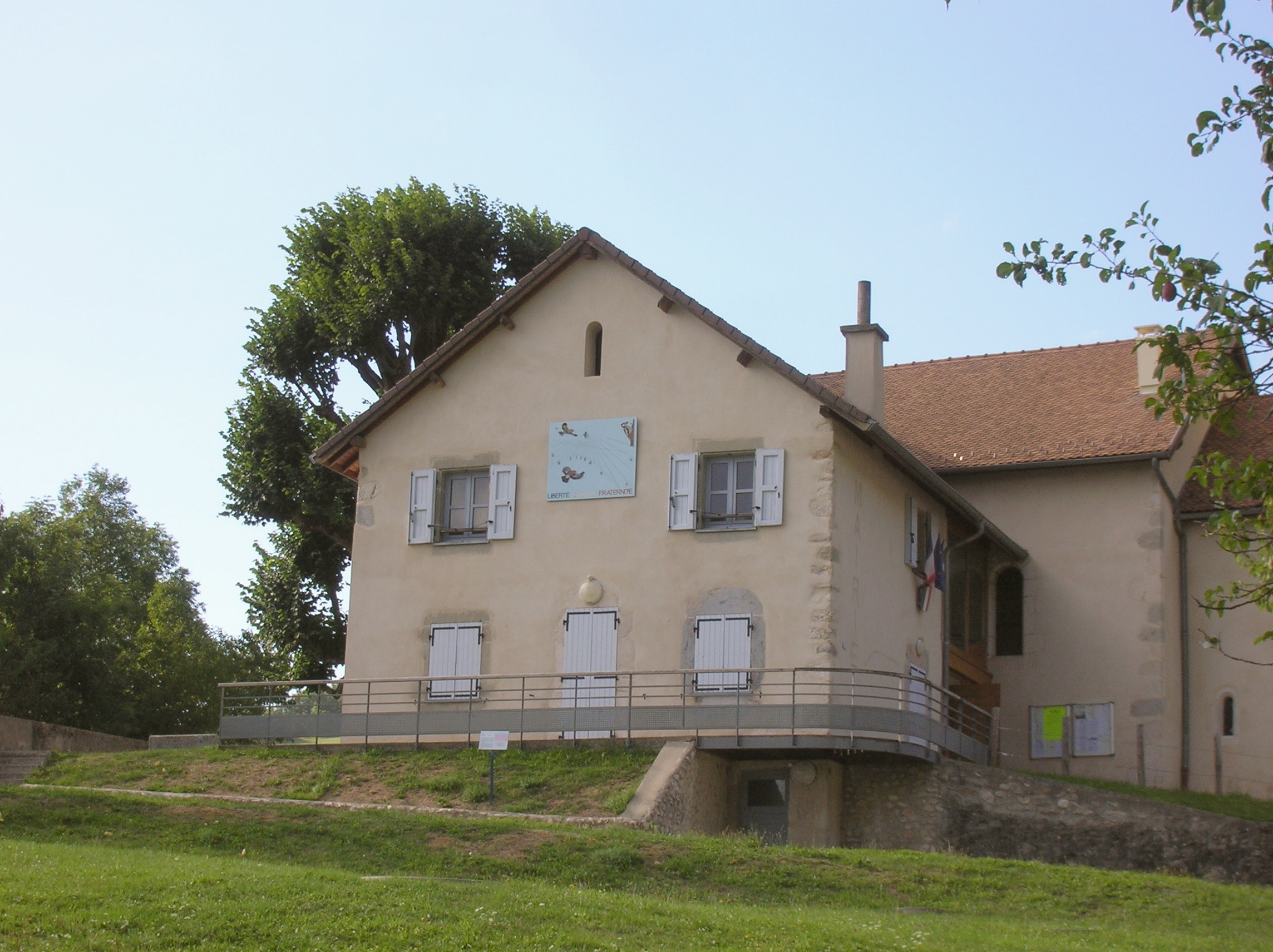 mairie de Mont-Saint-Martin (Isère) France.